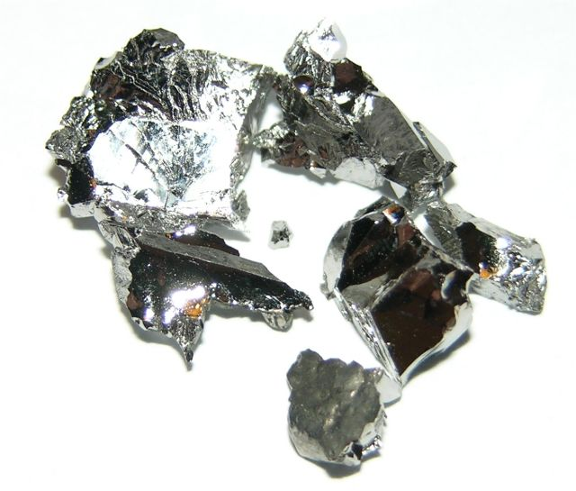 tungsten Bildbeschreibung: hochreines Wolfram Quelle: selbst fotografiert Fotograf: Tomihahndorf Datum: März 2006